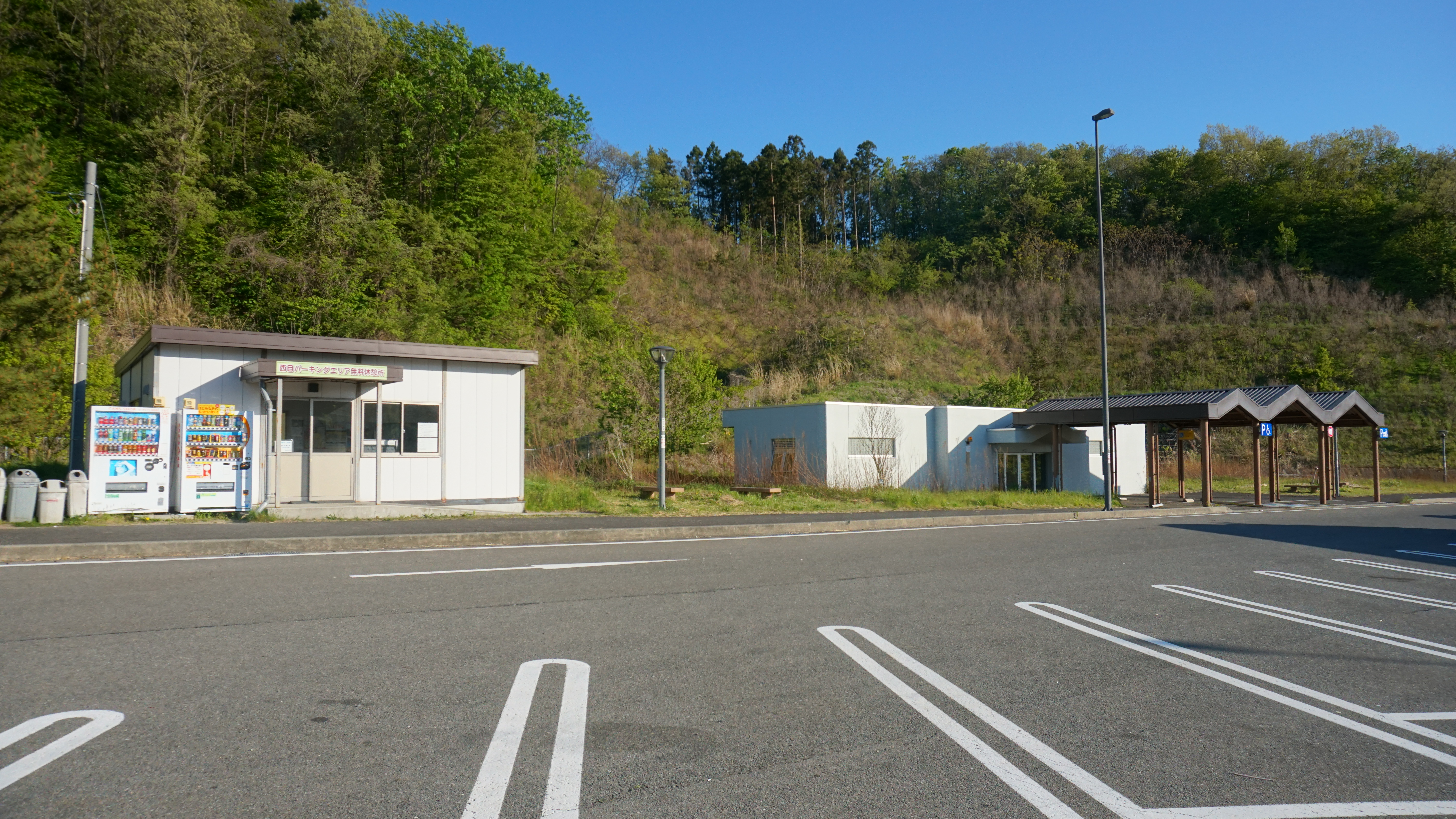 日本海東北自動車道・西目パーキングエリア（秋田県由利本荘市）